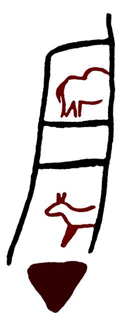 La llamada «Trampa» del panel 78 en la Galería C (tercer santuario) de la Cueva de La Pasiega, en el monte Castillo, localidad de Puente Viesgo (Cantabria, España)